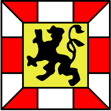 Wappen der Burggrafen von Nürnberg - Eventuell das Wappen der Herren von Raabs